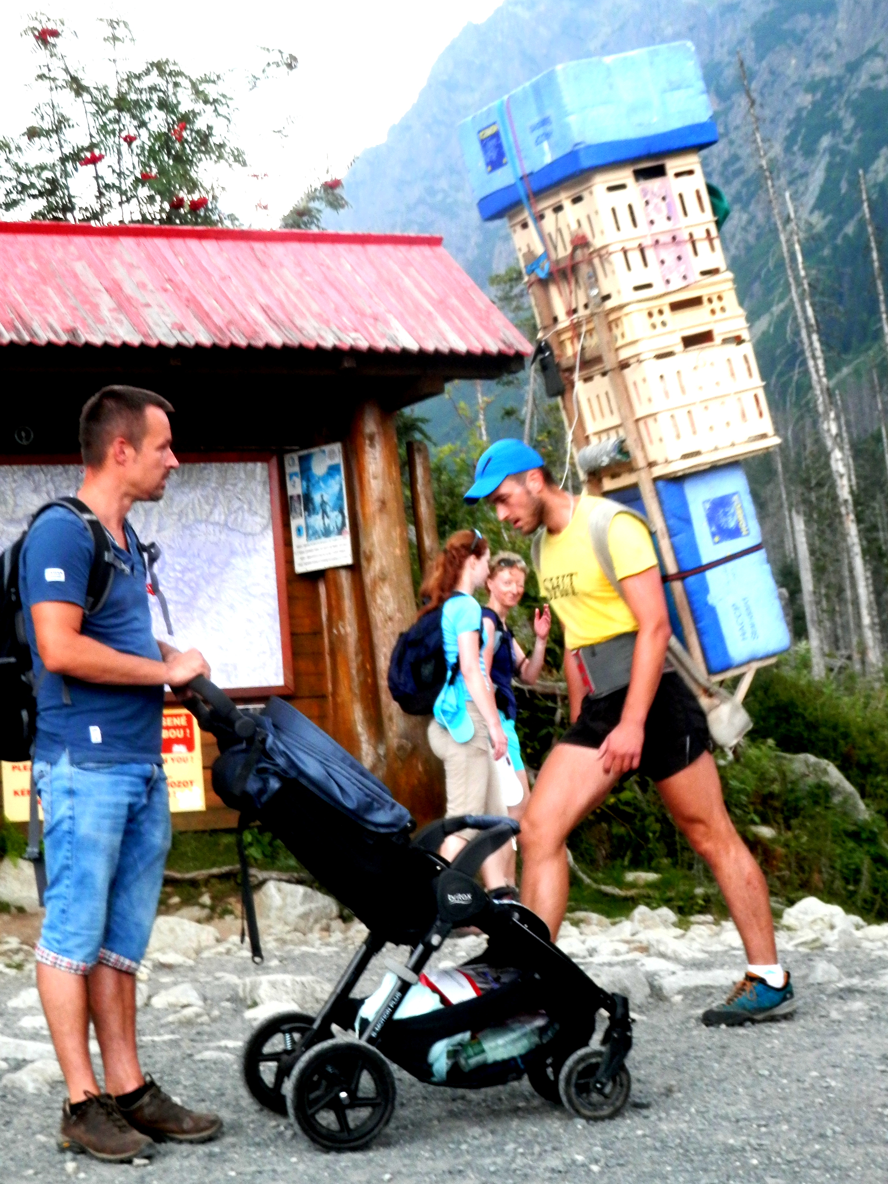 Leto 2018. Horský chodník Rázcestie nad Rainerovou útulňou. Horský nosič. Vysoké Tatry Slovensko.